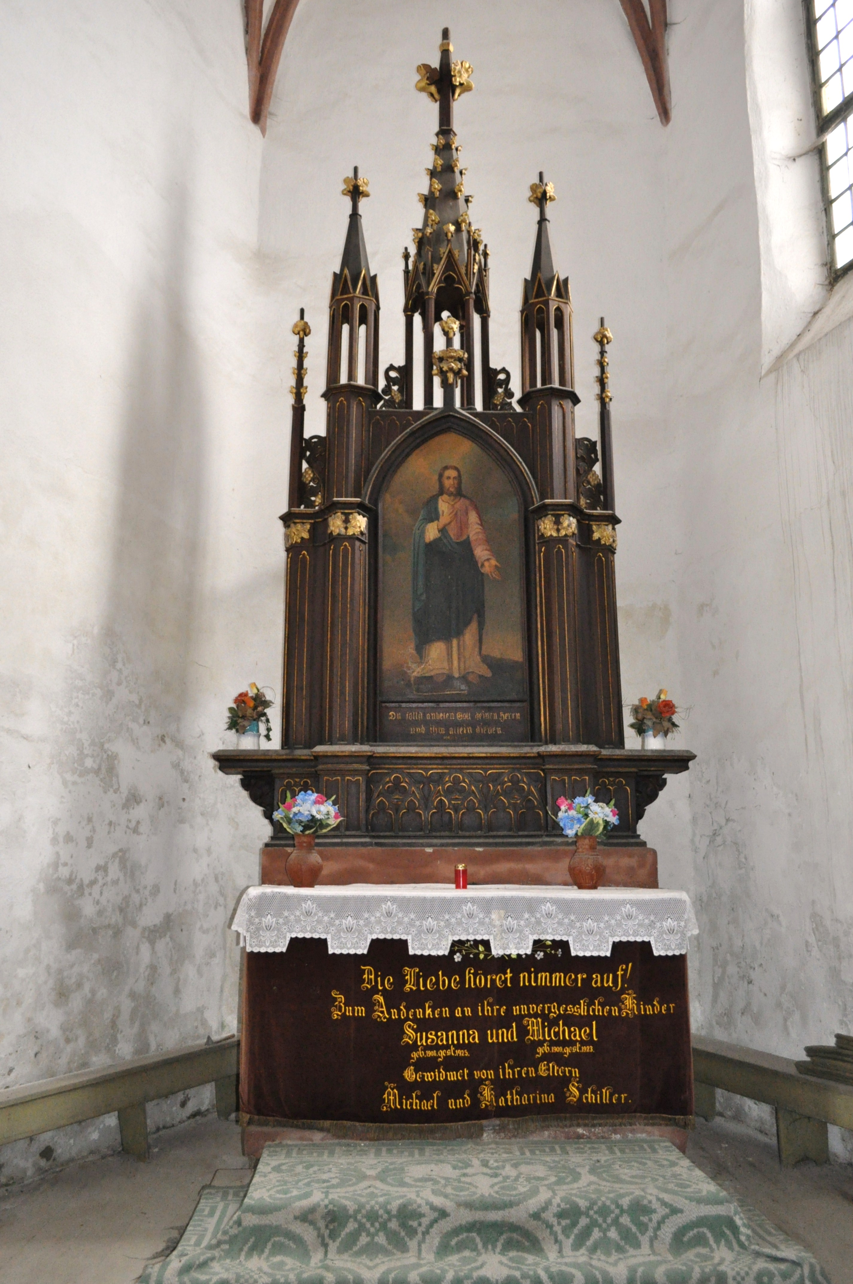 Biserica evanghelică fortificată, sat TÂRNAVA; comuna TÂRNAVA, județul Sibiu 01